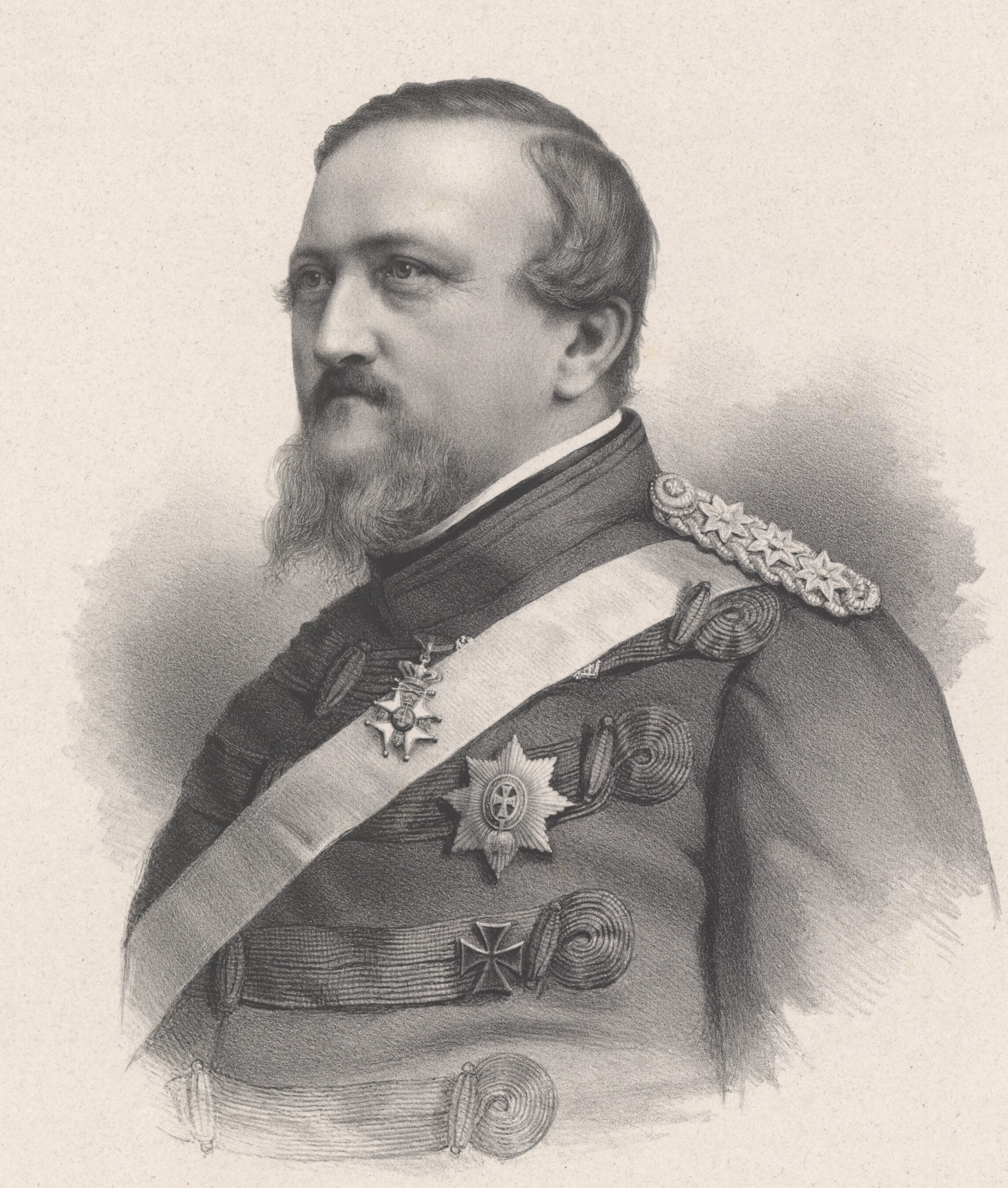 Frederik 7 of Denmark